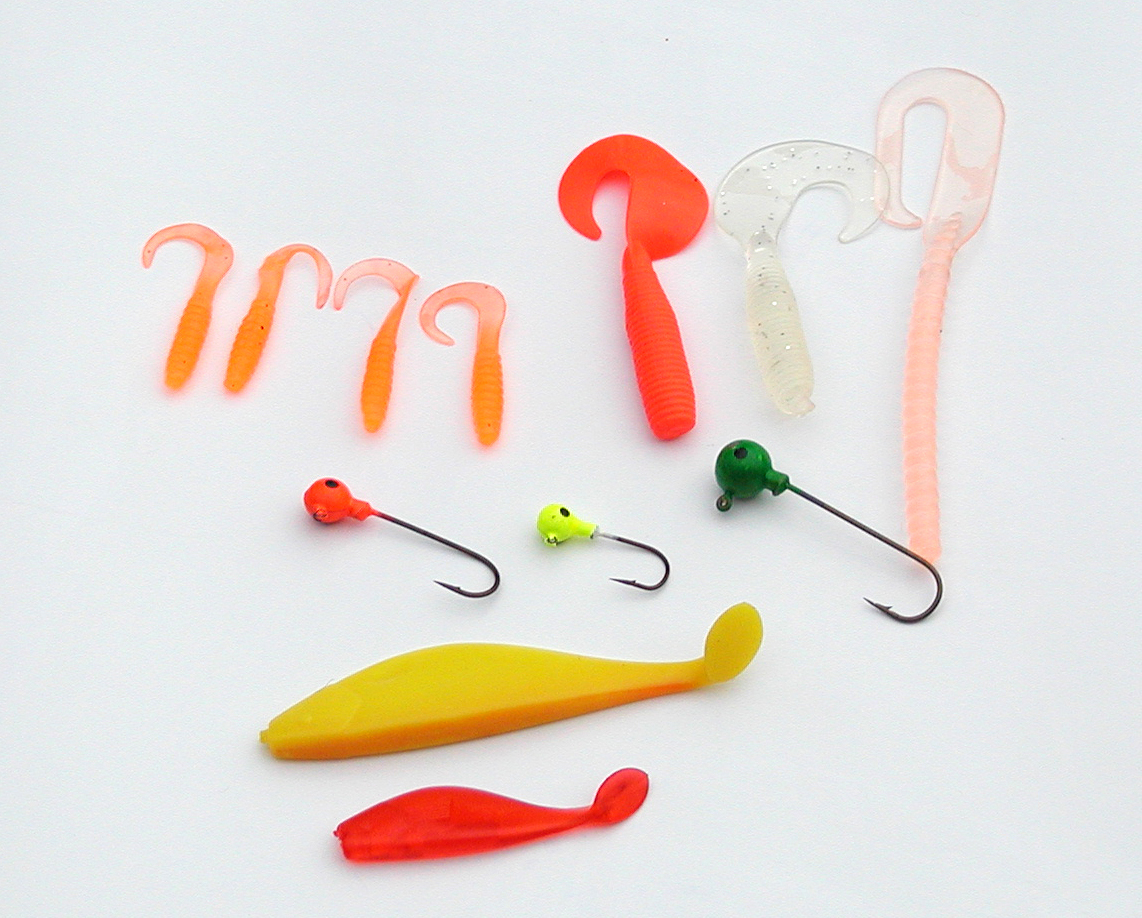 verschiedene Twister (Angelzubehör)